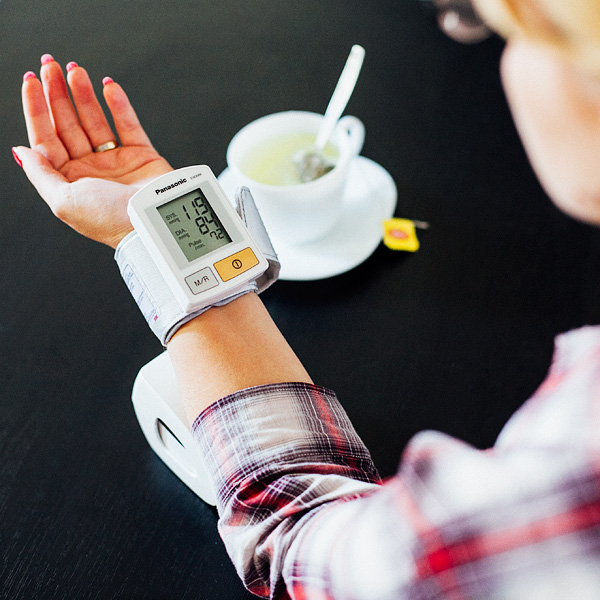 Srpski (latinica): merenje krvnog pritiska na članku ruke Srpski (latinica): мерење крвног притиска на чланку руке